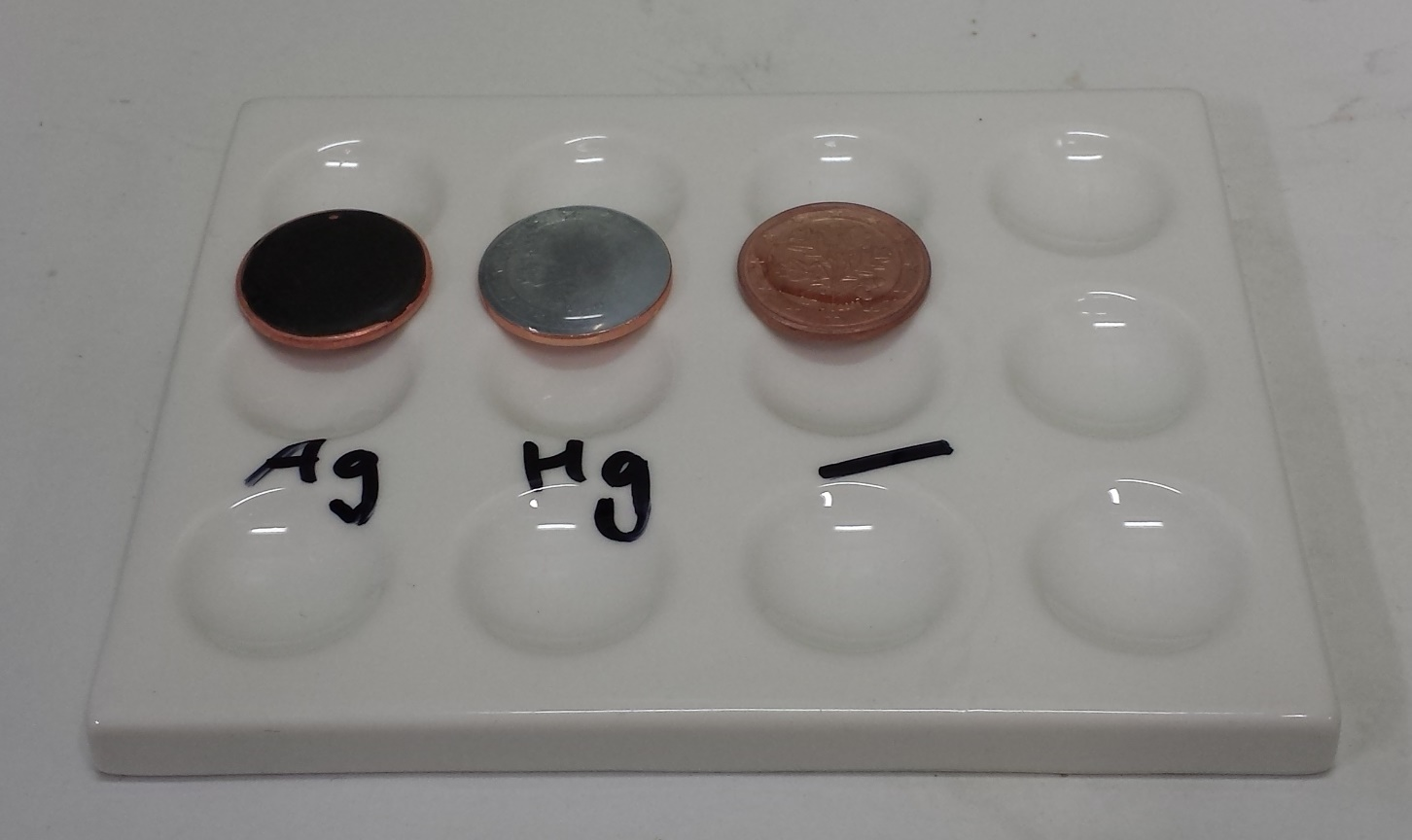 Silber, Quecksilber und eine Probe die keines der beiden enthält auf einer mit HCl sauber geätzten 5 Cent Münze.